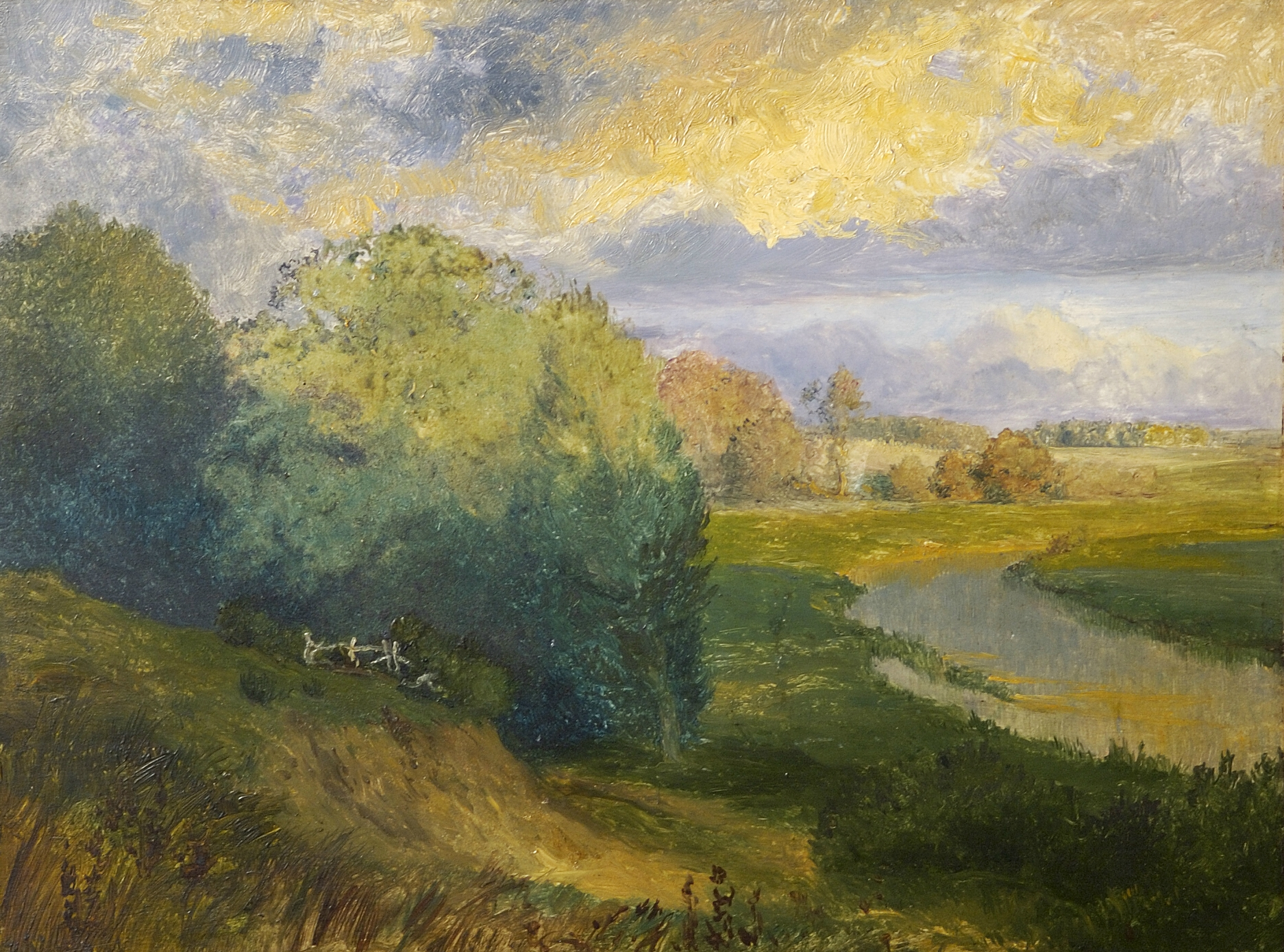 Georg Müller vom Siel (1865–1939) - Huntelandschaft bei Dötlingen